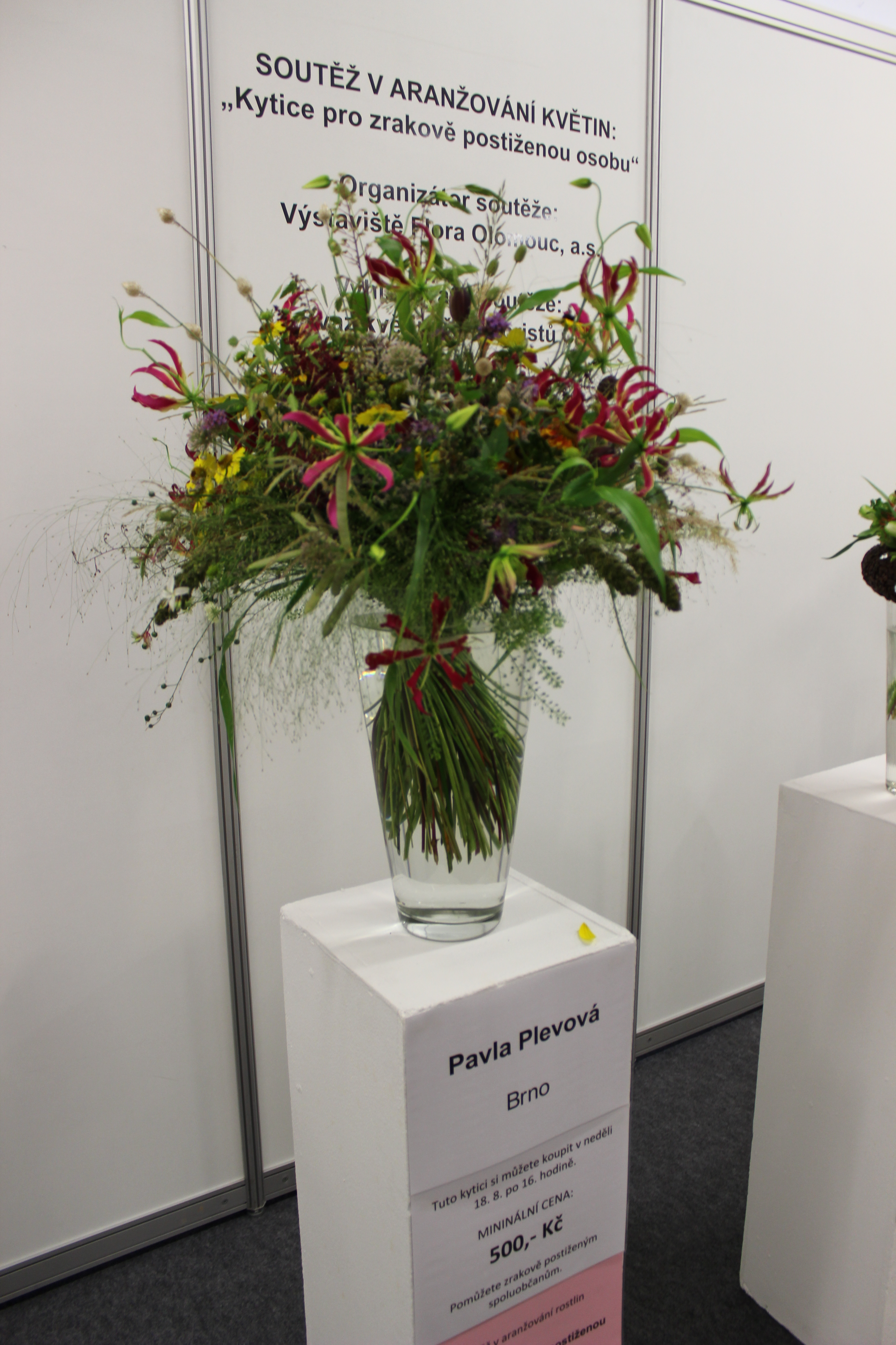 Vítězná květina soutěže v aranžování kytic pro zrakově postižené osoby.